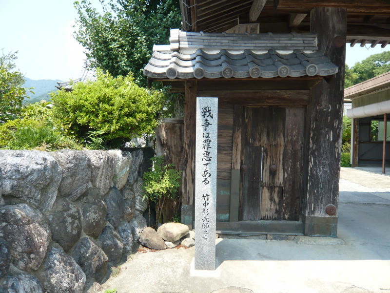 垂井町岩手、明泉寺。竹中彰元「戦争は罪悪である」